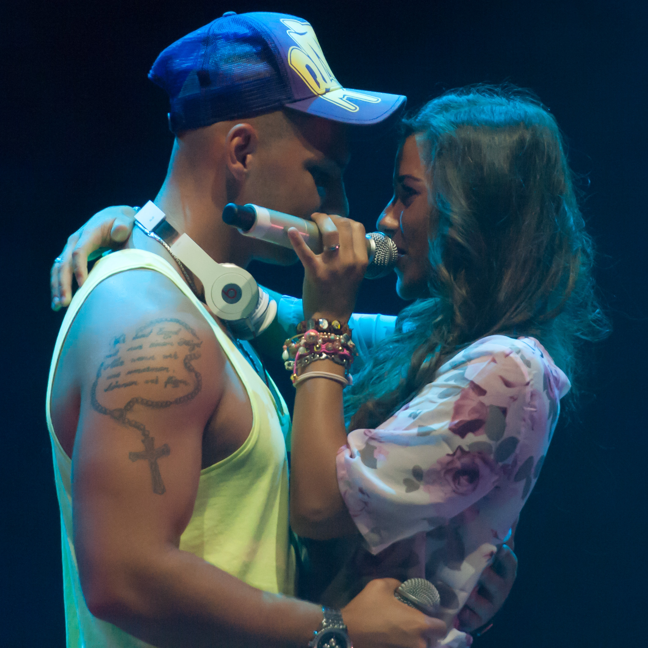 DSDS - Live on Tour 27. Juli 2014, Stadthalle Wien Sarah Engels und Pietro Lombardi